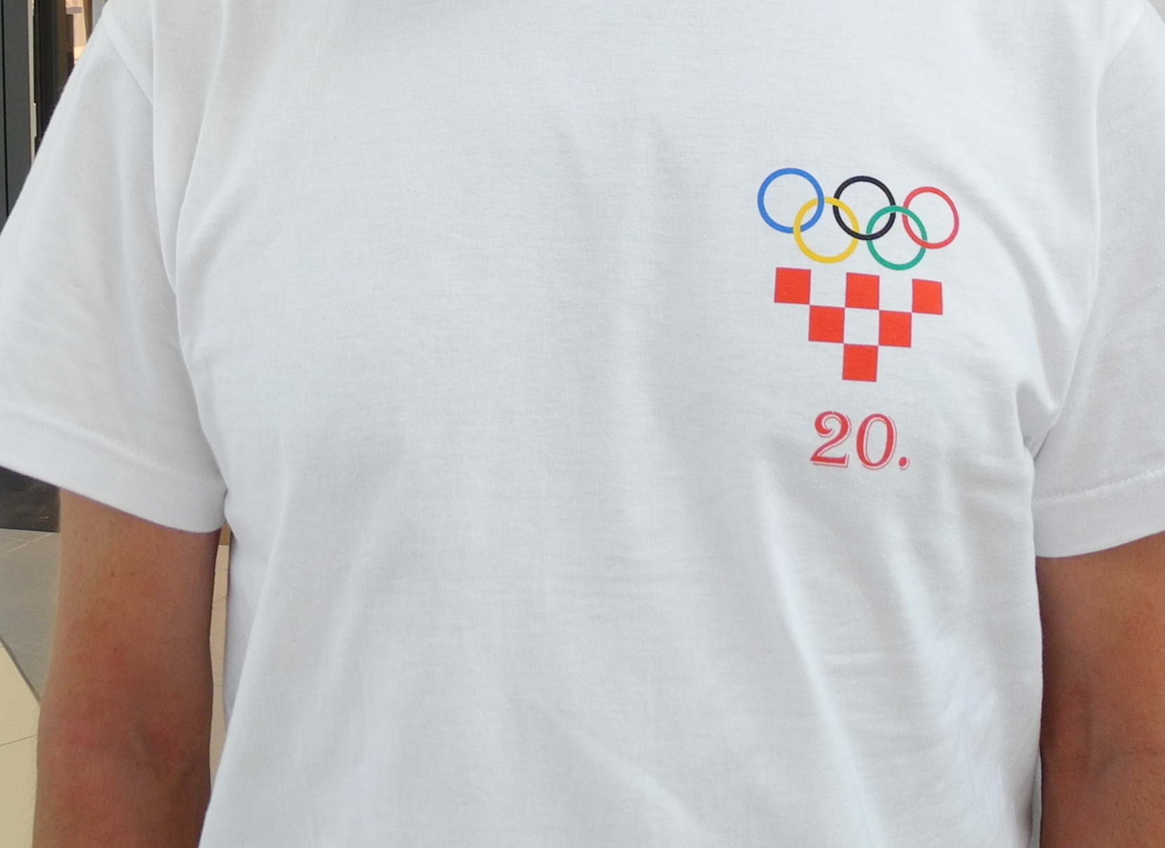 Majice za sudionike festivala športa na RŠC Jarun povodom proslave 20. rođendana Hrvatskog olimpijskog odbora